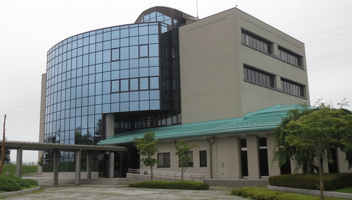 八戸圏域水道企業団の外観